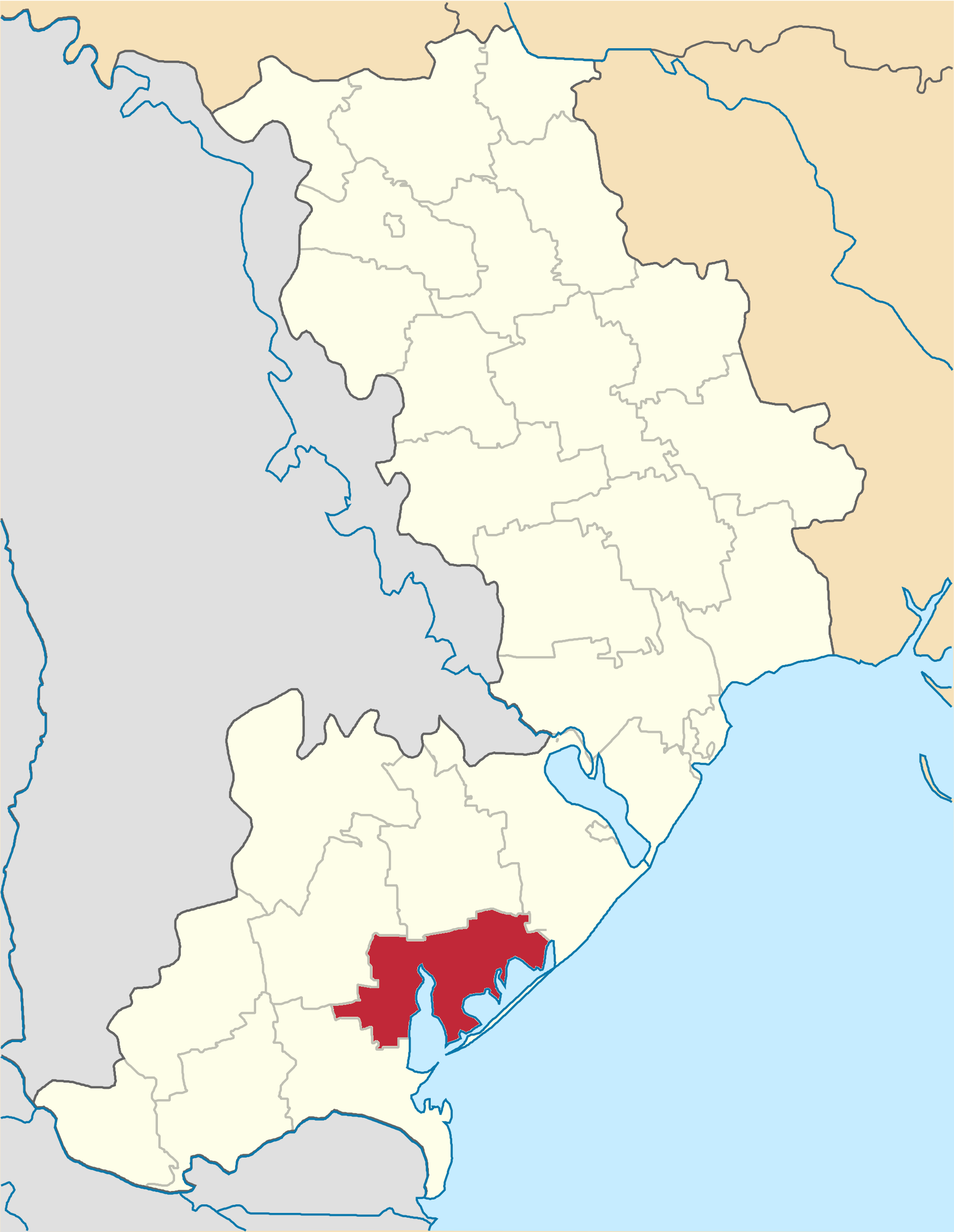 Tatarbunarskyi-Raion map